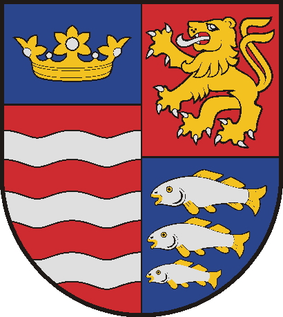 Herb Kraju Preszowskiego